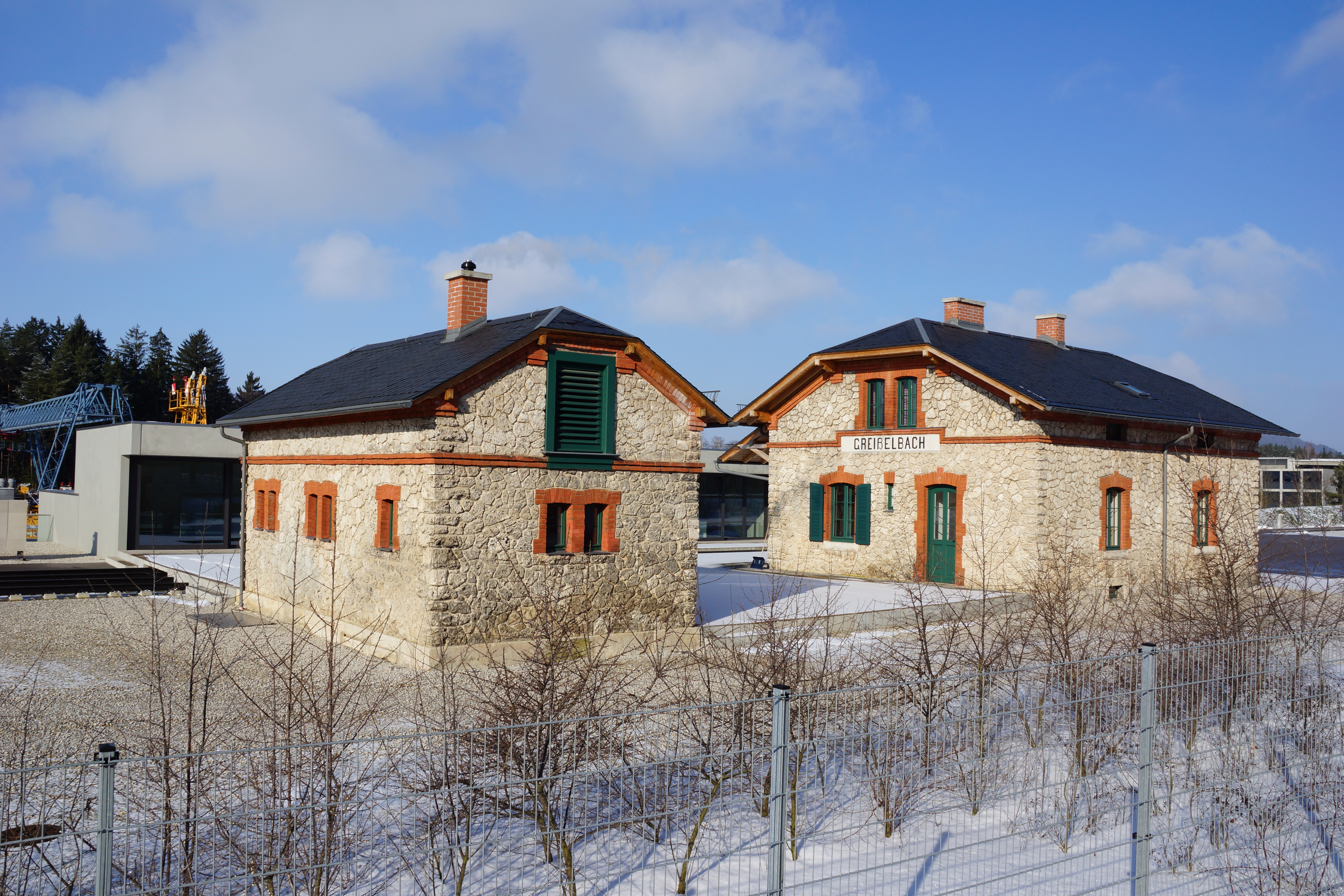 Der ehemalige Bahnhof der Oberpfälzer Sulztalbahn in Greißelbach, Gemeinde Sengenthal.